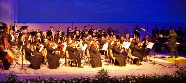 Государственный симфонический оркестр Азербайджана